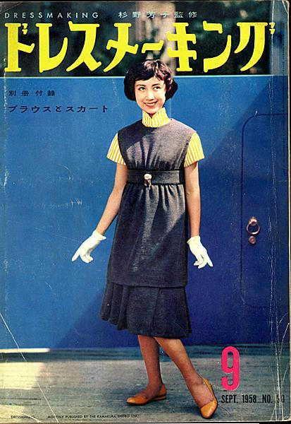 ドレスメーキング、1958年9月号